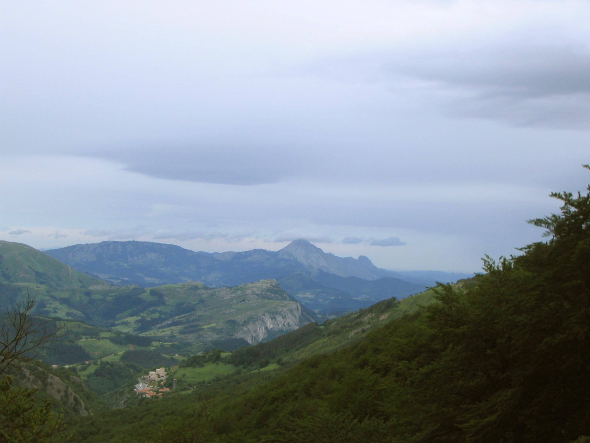 Vista Euskadi desde Urbia